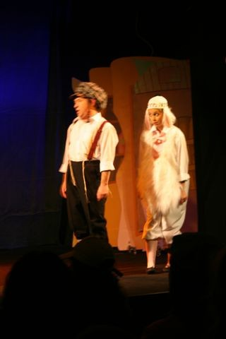 ערן בן-זאב כציפקה